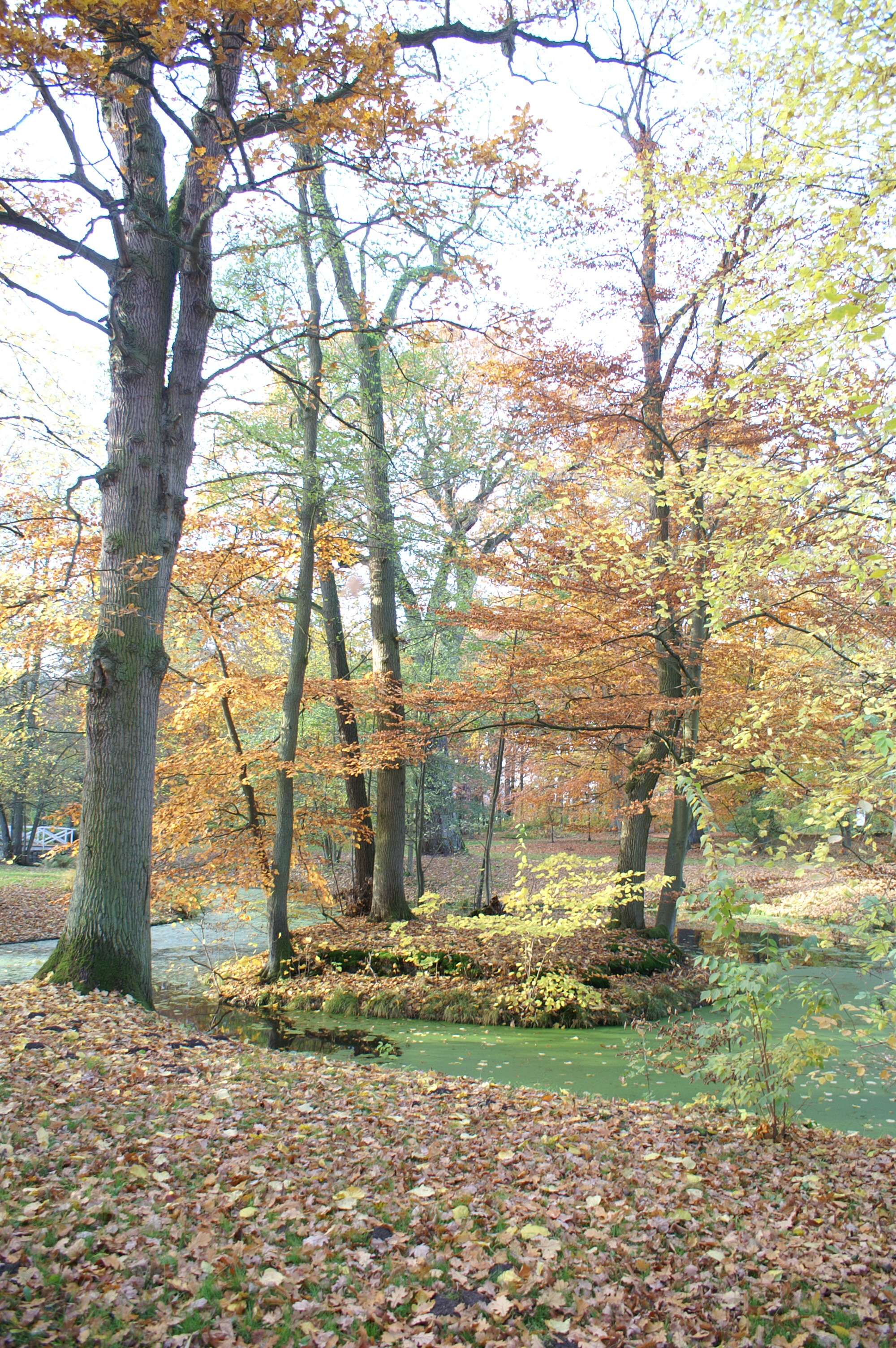 Schlosspark Schlemmin - Insel im Teich